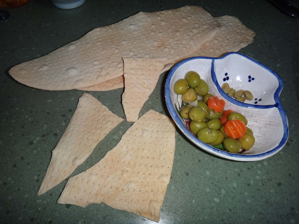 Regañás de tamaño grande y aceitunas verdiales aliñadas